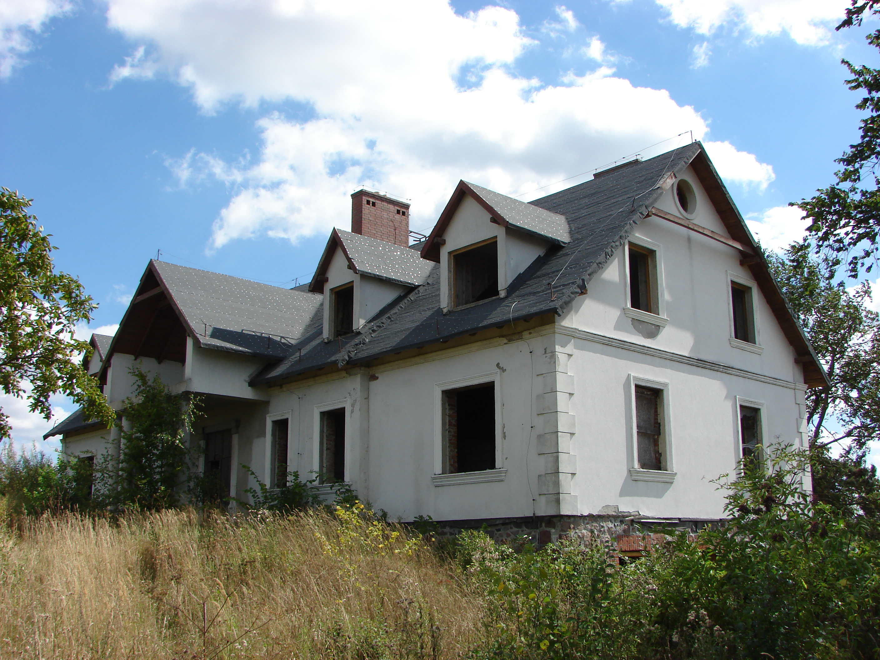 Łąki Wielkie, Gmina Boniewo, dwór w trakcie remontu.